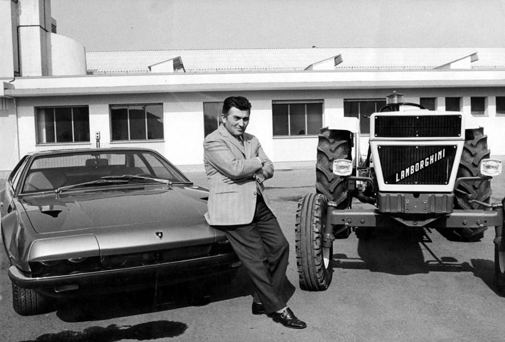 anni '70 Ferruccio Lamborghini fotografato tra un trattore e una vettura Lamborghini